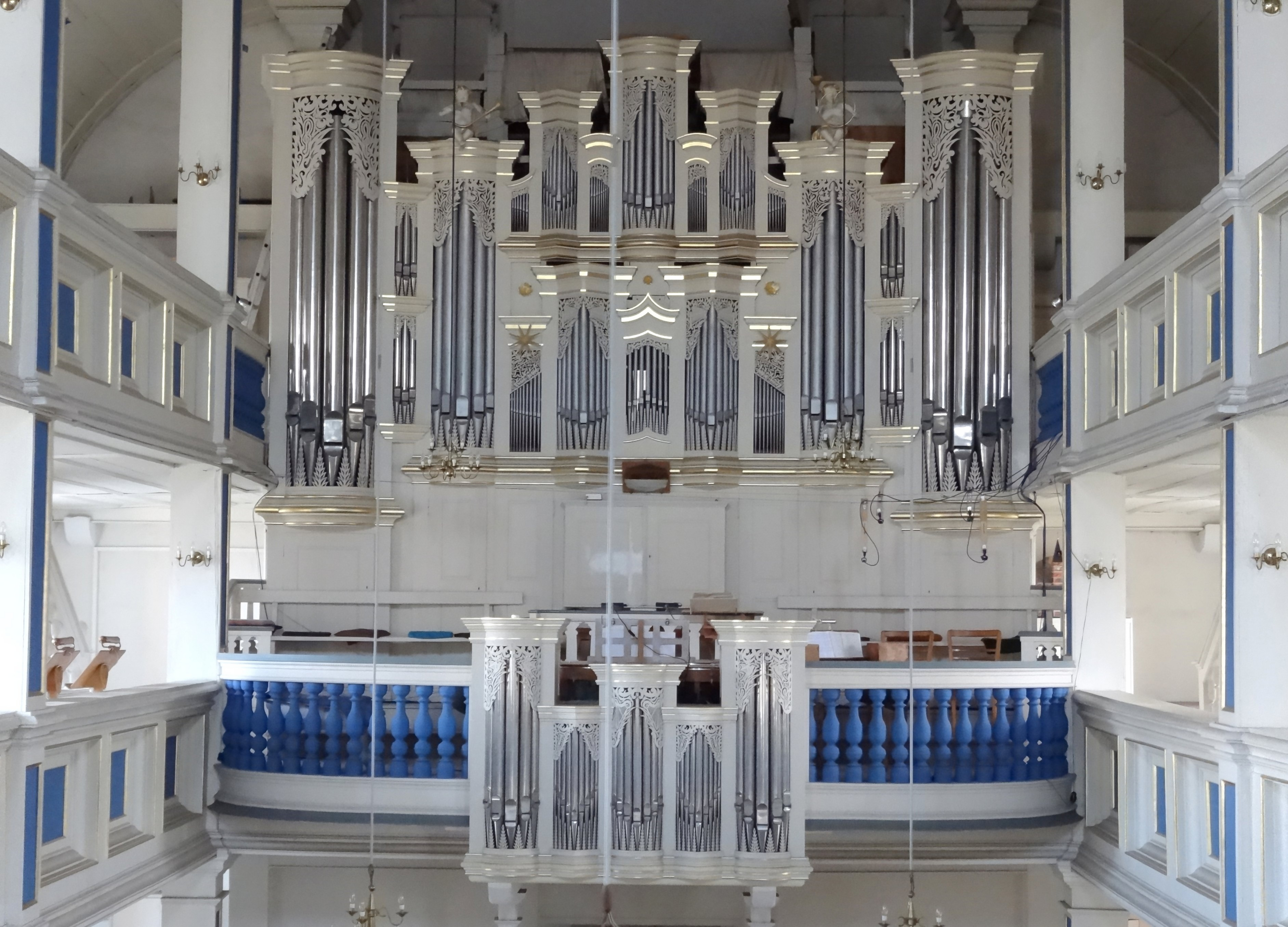 Die große Orgel der Dorfkirche St. Nikolai in Sundhausen wurde 1796 von Johann Nicolaus Langenhan errichtet. Die Gebrüder Manfred & Siegfried Sperlich reparierten und versetzten die große Orgel 1983 von der zweiten auf die erste Empore um die Gebäudestabilität und den Klang zu verbessern.